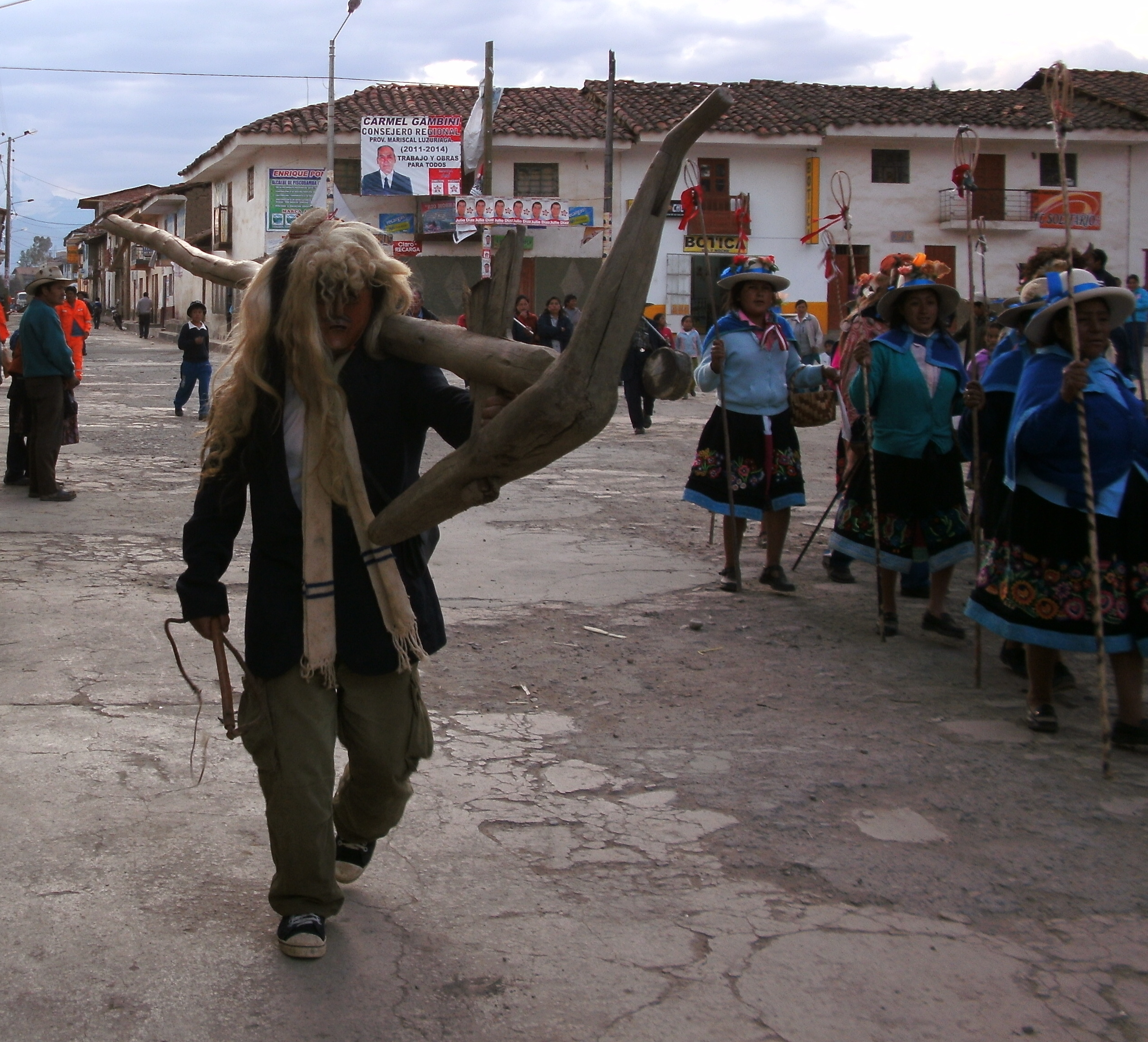 Representa a un ejecutante de la danza tinya palla, es el amauta.